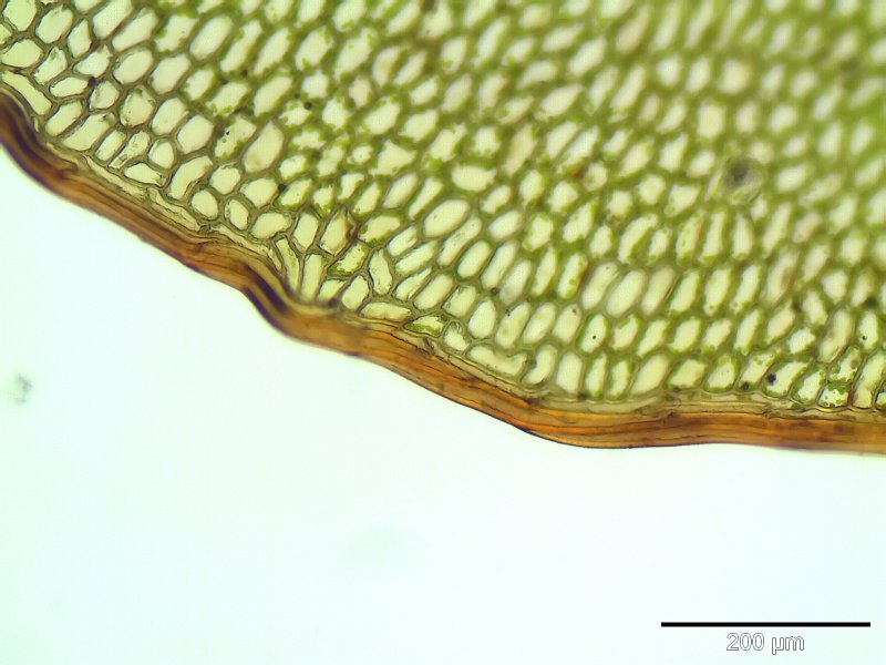 Dunkelblättriges Kuppelmoos (Cinclidium stygium), Blattrand, 125x